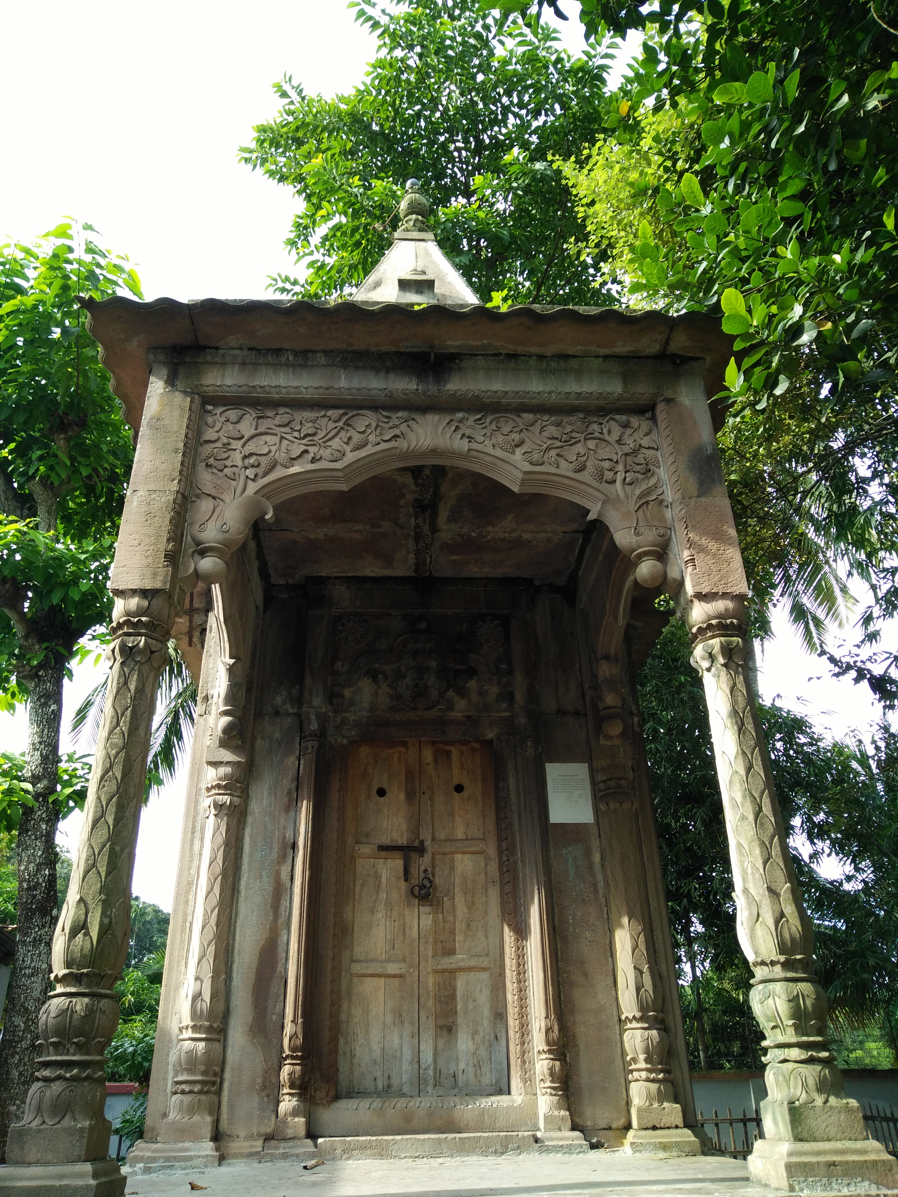 পাথরের শিব মন্দির